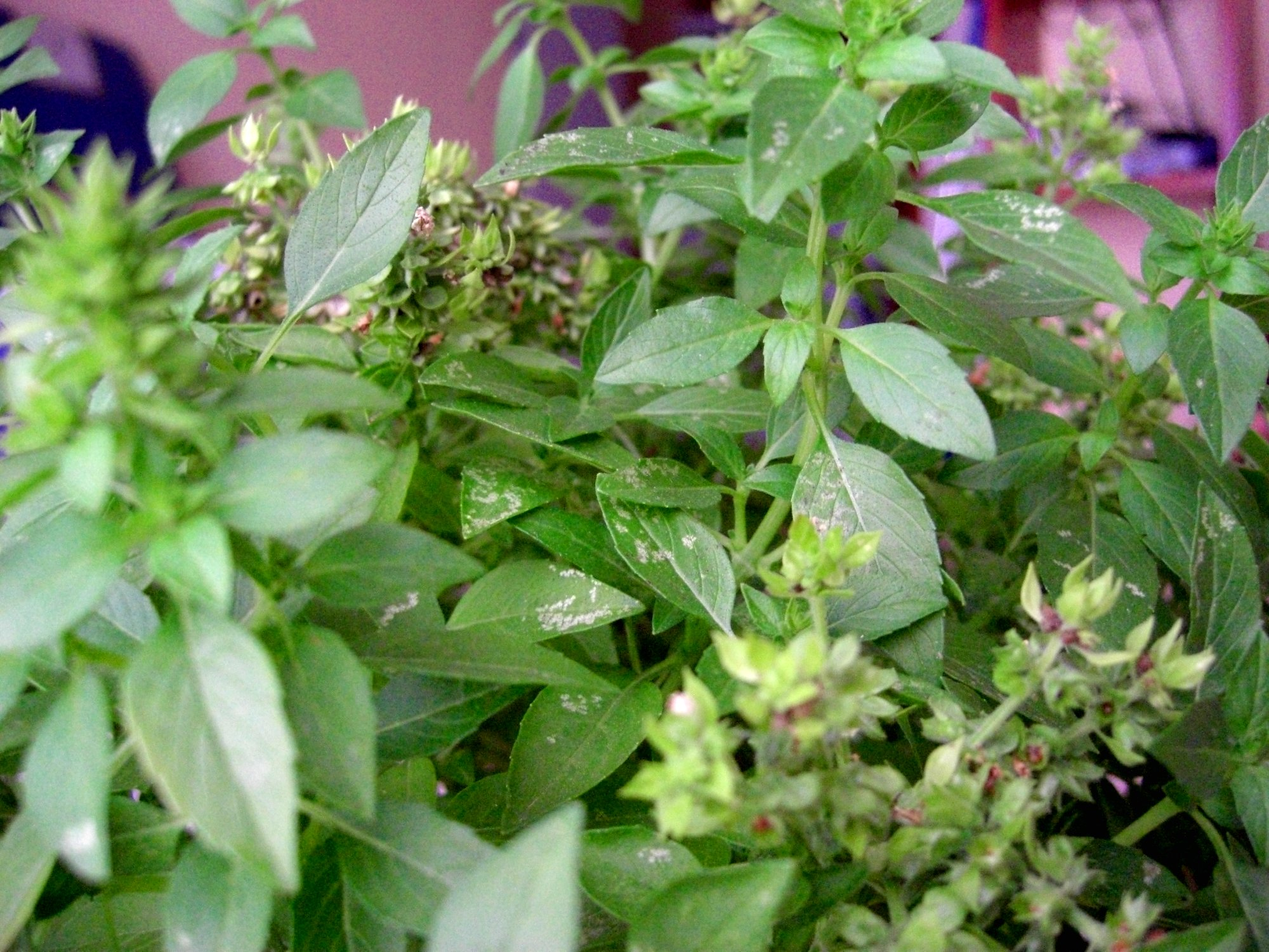 Planta de Albahaca en flor.